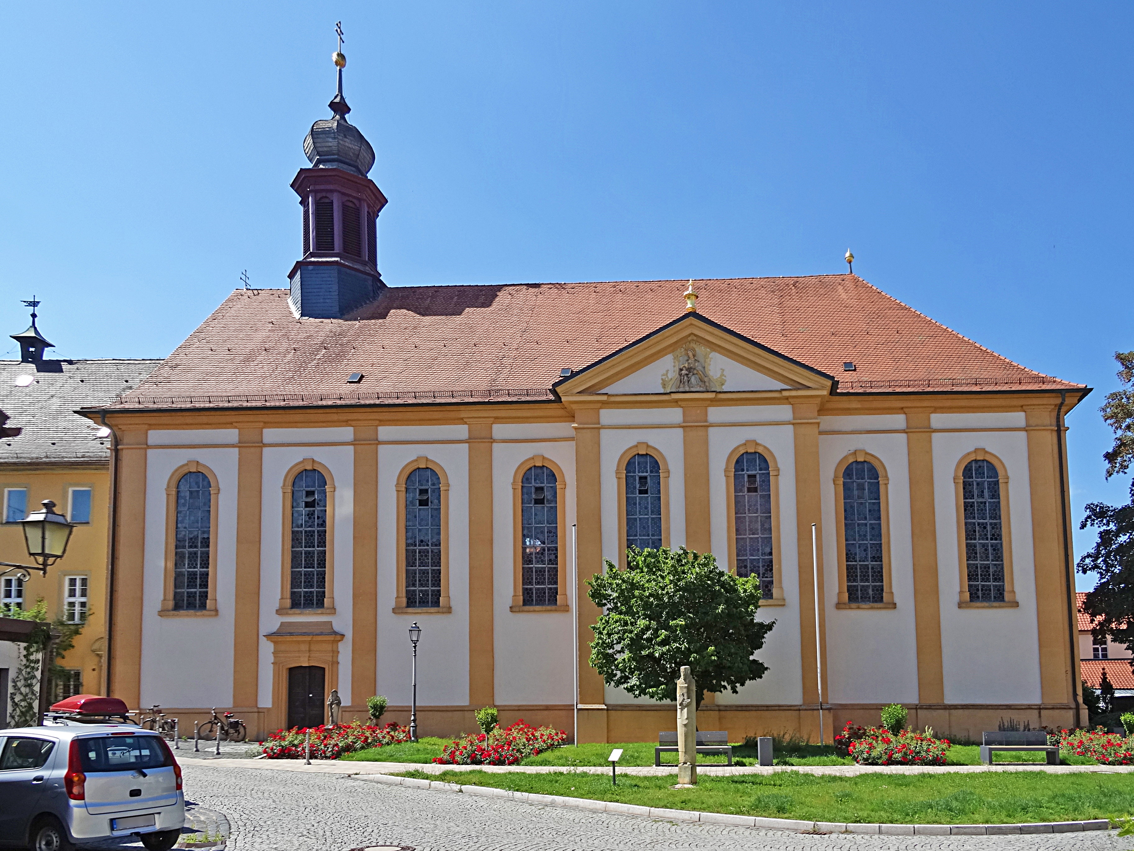 Augustinerkloster St. Michael (Münnerstadt) von Süden